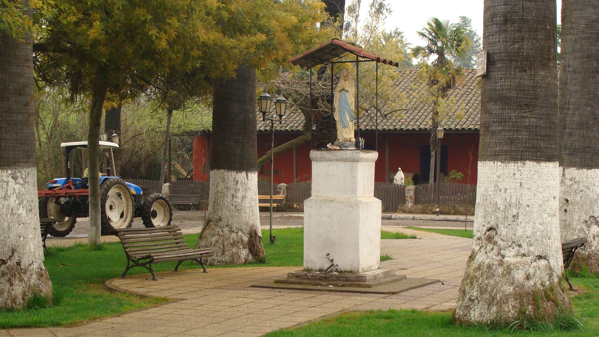 Plaza de Guacarhue This is a photo of a national monument in Chile: 379